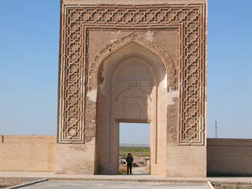 Автор данной фотографии-Дмитрий Питиримов дал мне полное право на размещение, публикацию его фотографий на сайте энциклопедии без предварительного оповещения